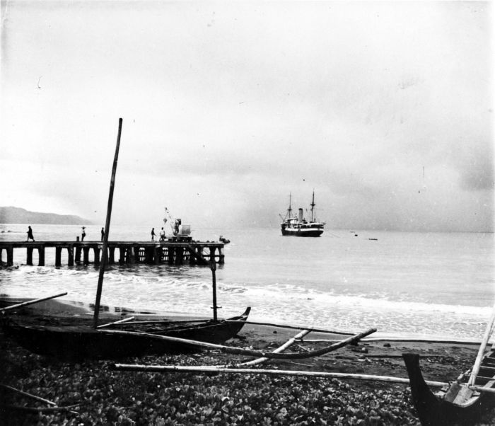 Repronegatief. K.P.M. stomer 'Kidul' in de Wijnkoopsbaai (Pelabuanratu), Java